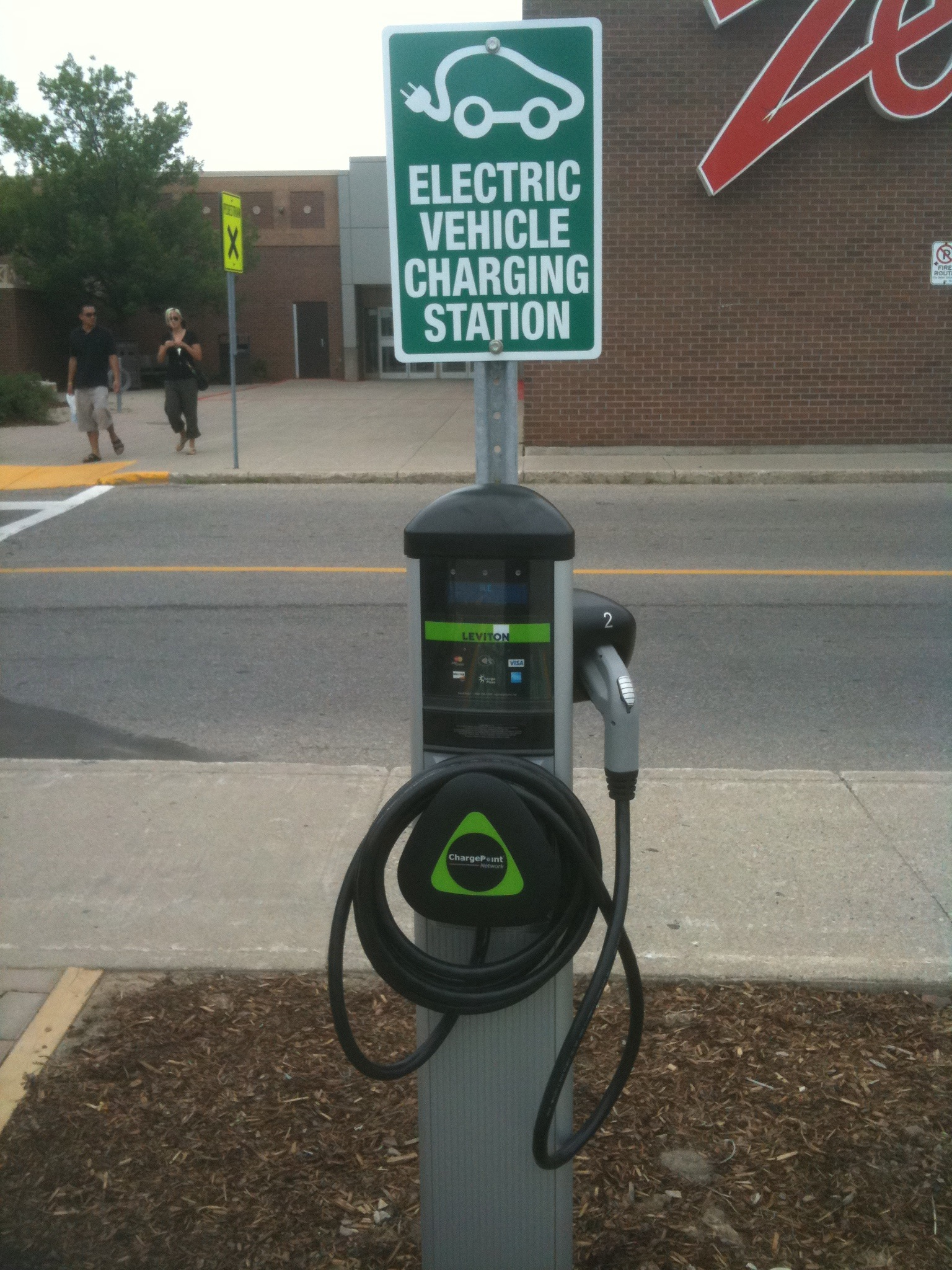 At Conestoga Mall